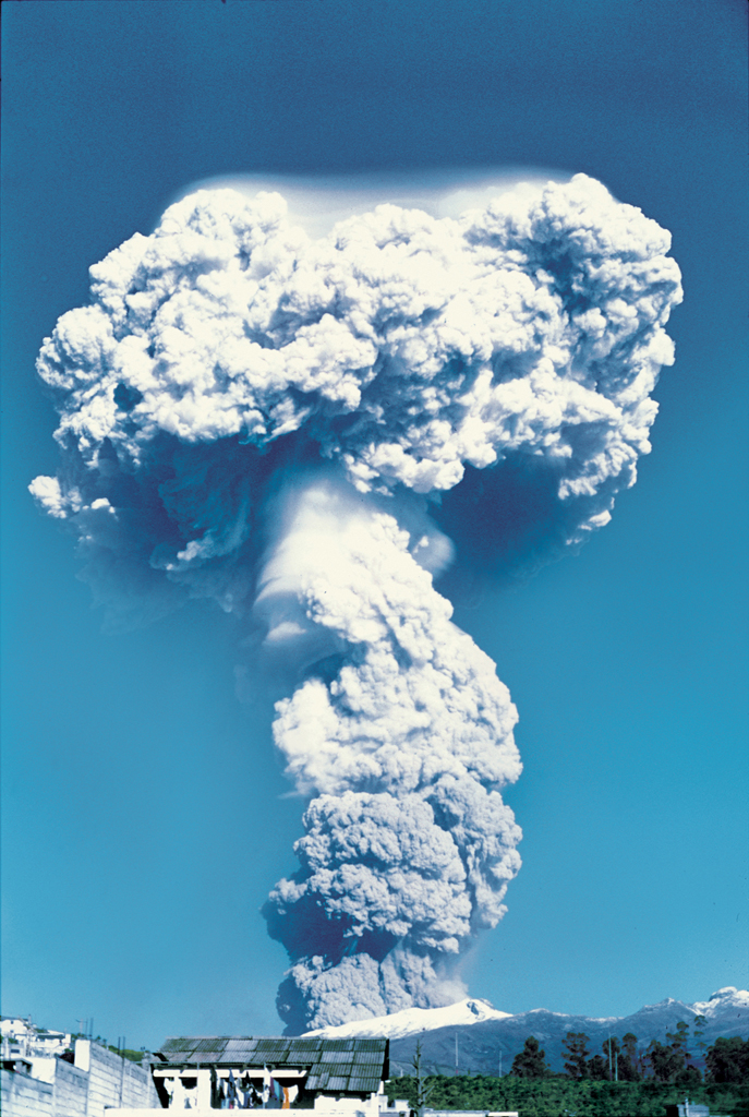 erupcion del volcan guagua pichincha el año 2000